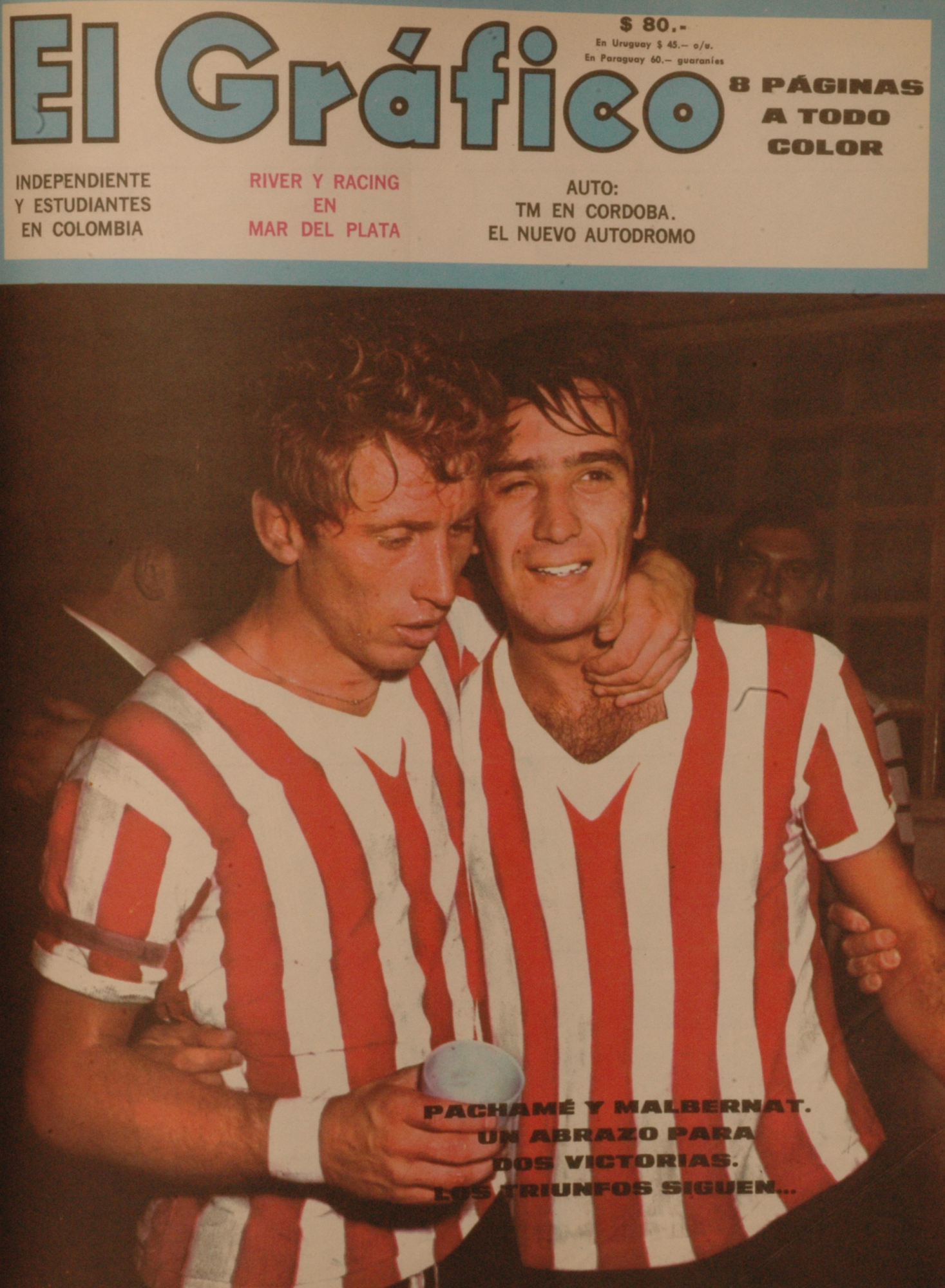 El Gráfico del 13 de Febrero de 1968. Edición 2523.